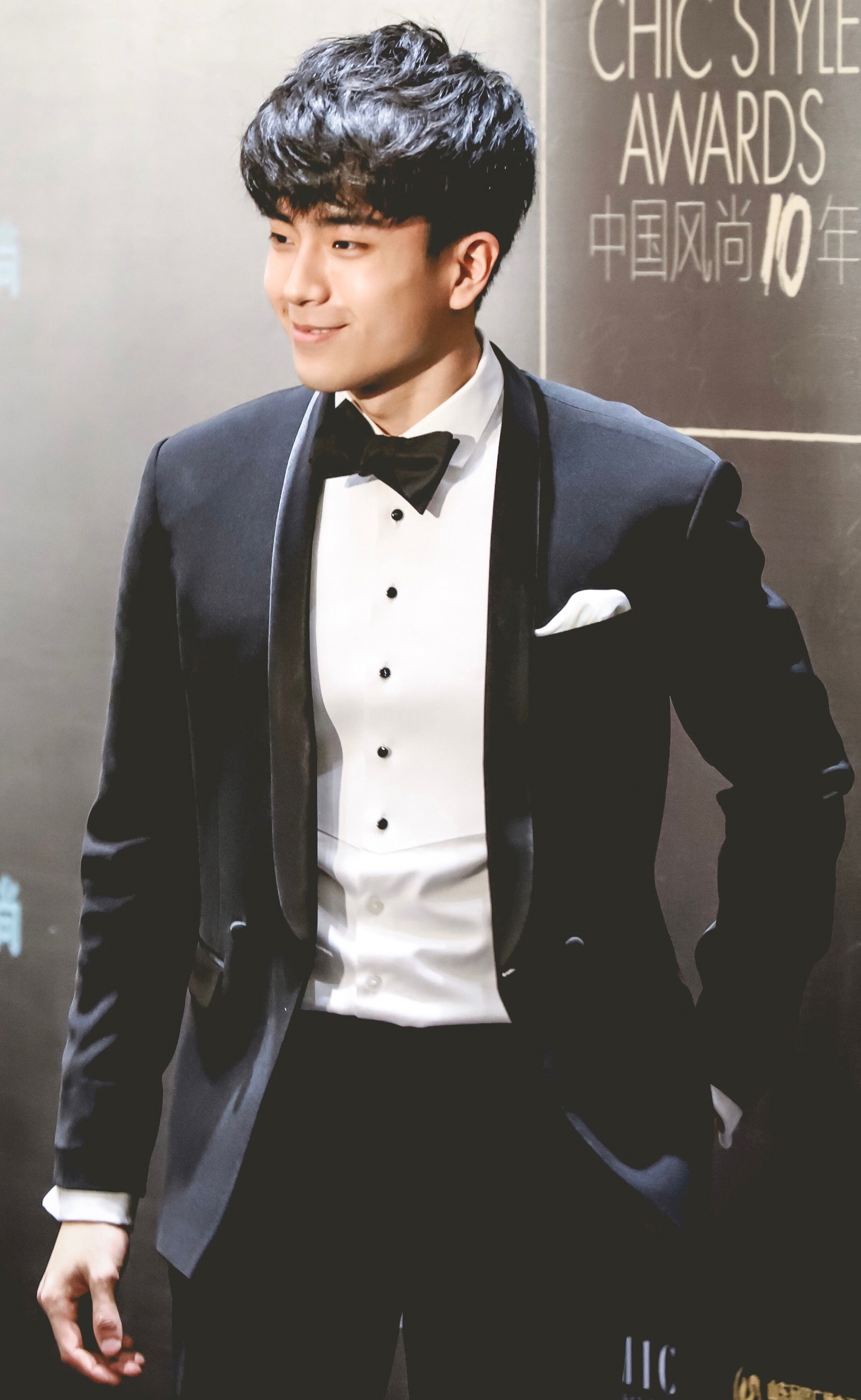 180116 小资风尚 红毯 Nonkul